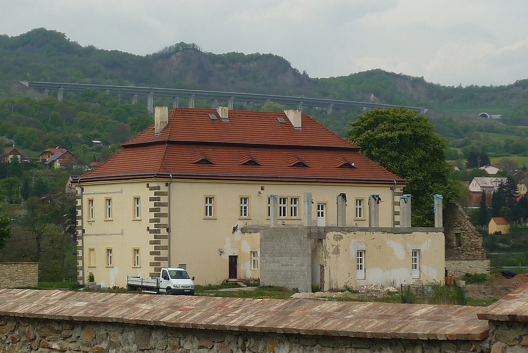 Schloss Libochowan (Libochovany) an der Elbe im Böhmischen Mittelgebirge